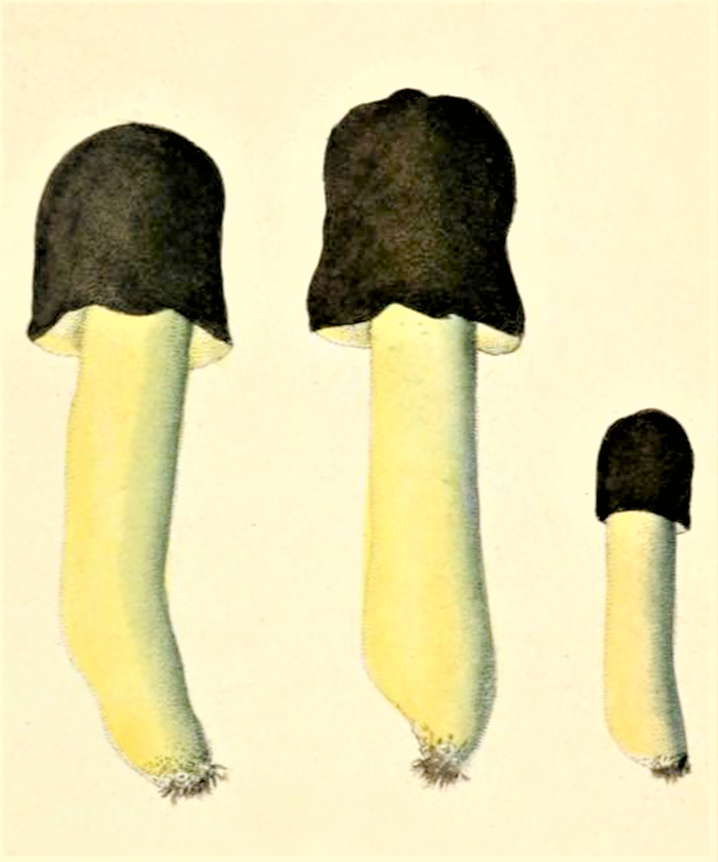 Jacob Sturm: Verpa conica (O.F.Müll.) Sw. (1815)